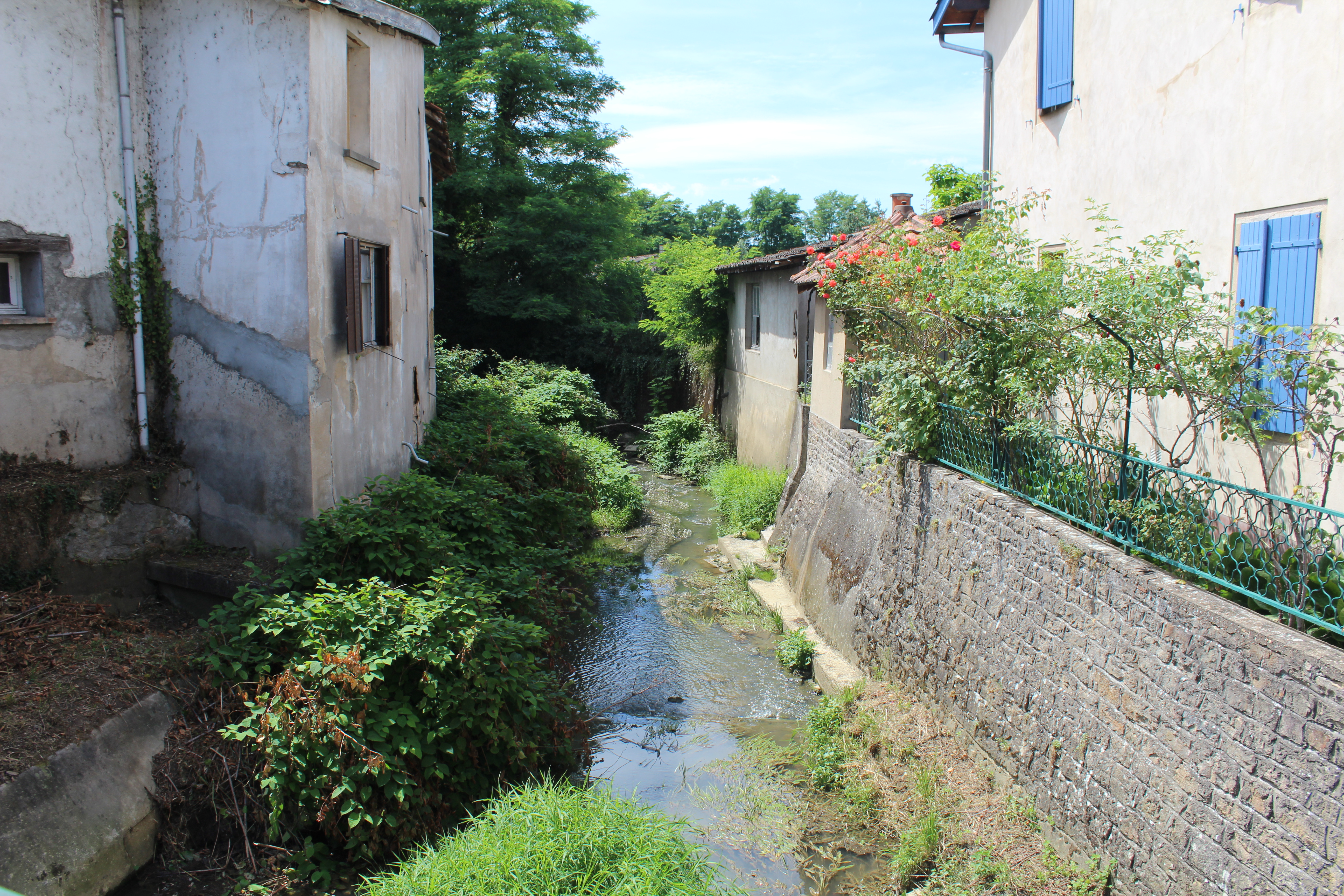 Bief du Malivert à la frontière entre Laiz et Pont-de-Veyle au lieu-dit Les Dîmes.